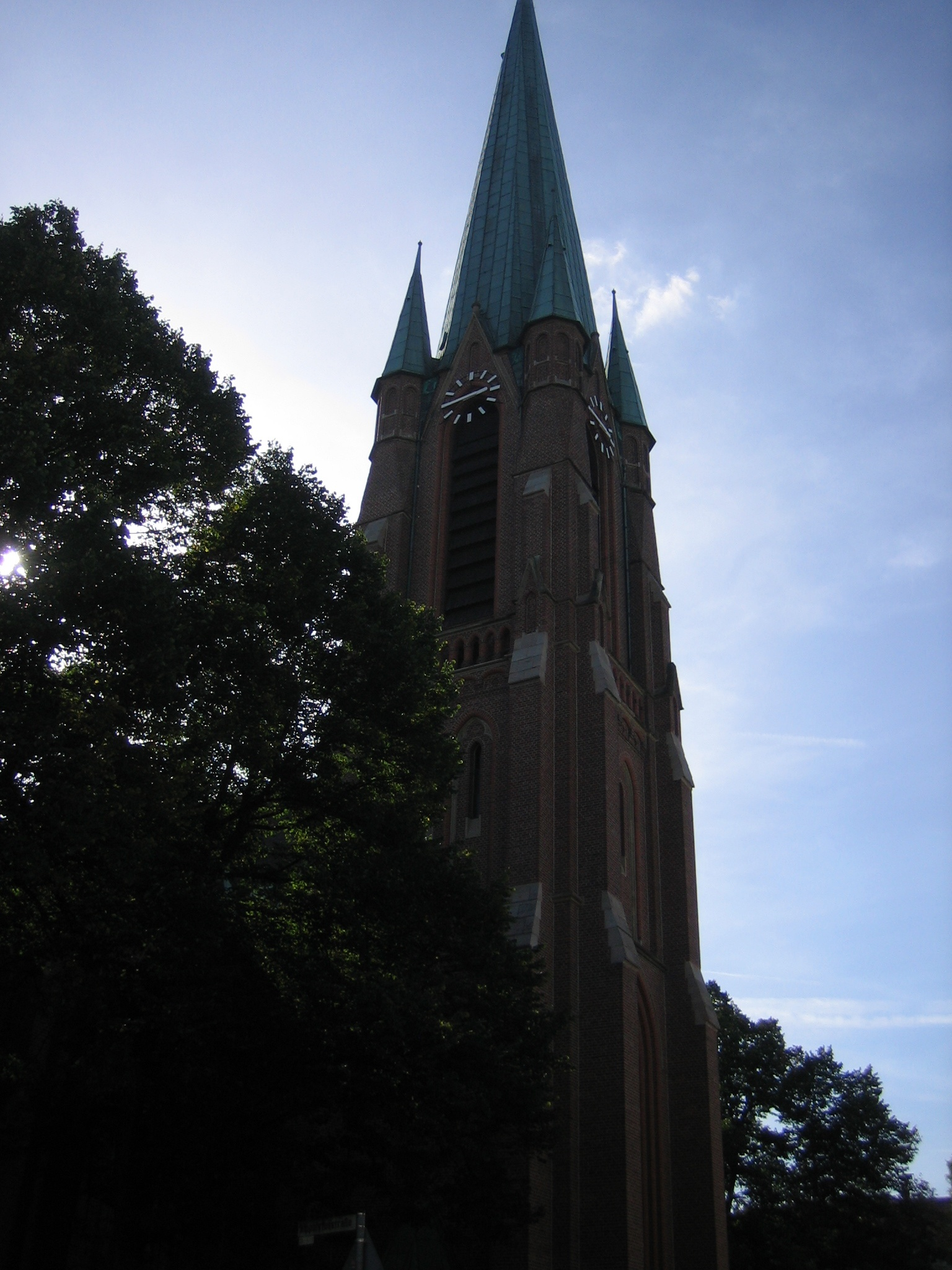 Turm der Hippolytuskirche in Gelsenkirchen-Horst